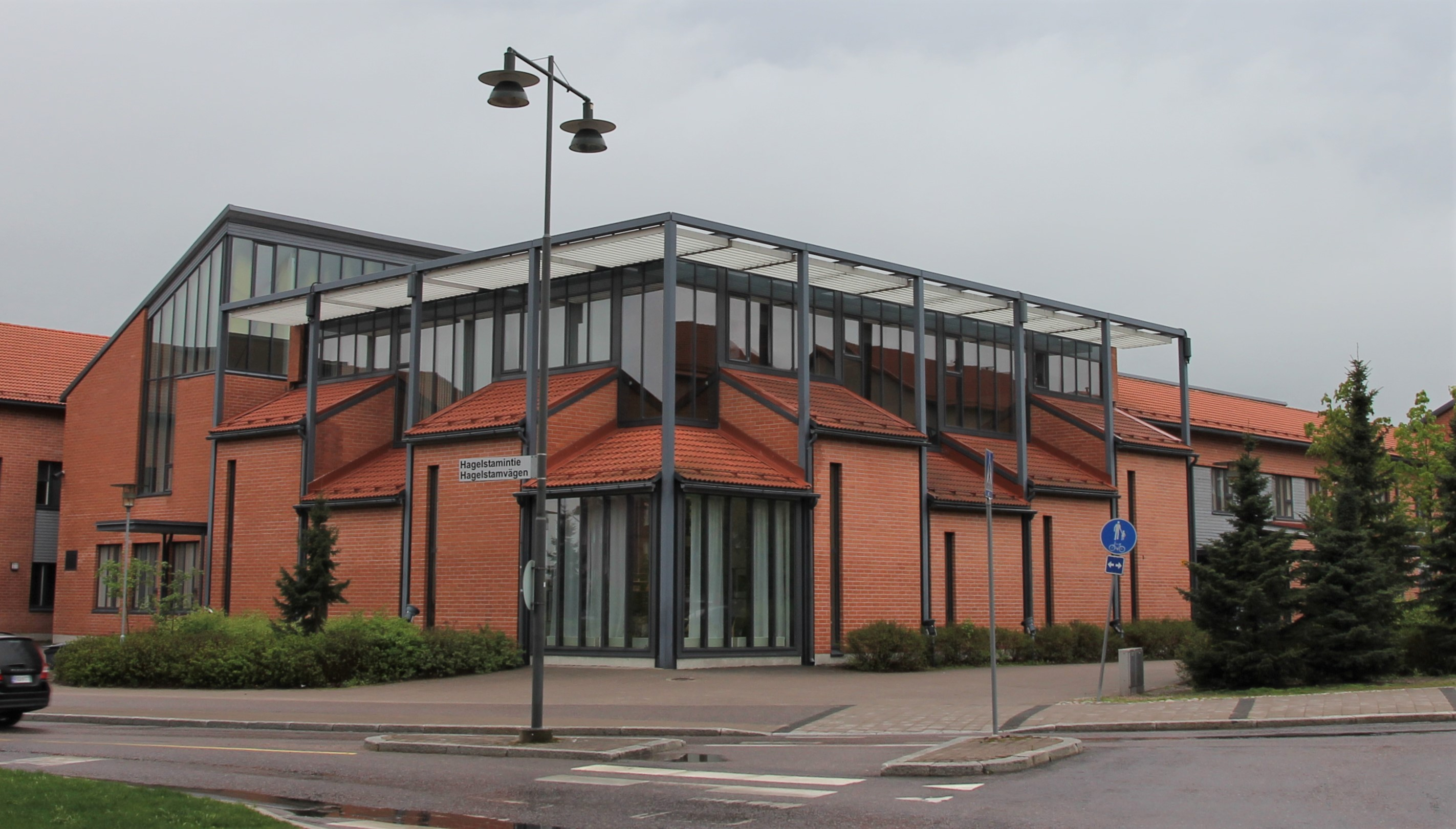 Pointin kirjasto on eräs Vantaan kaupunginkirjaston toimipisteistä. Se sijaitsee osoitteessa Hagelstamintie 1, Vantaan Pakkalan kaupunginosassa. Samassa rakennuksessa toimii Vantaan kansainvälinen koulu, sekä päiväkoti. Kuva toukokuulta 2016.